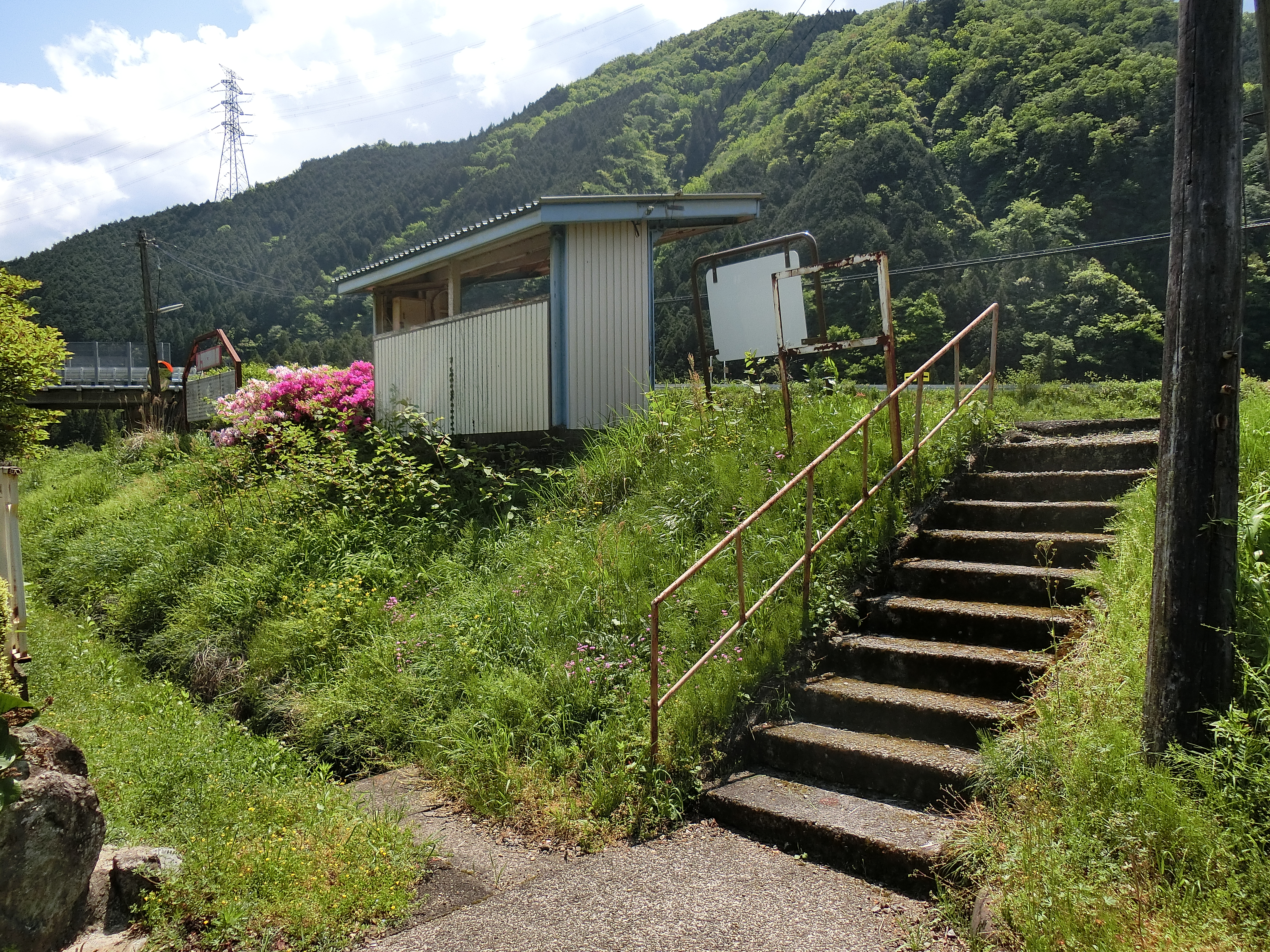 八坂駅 (岐阜県)入口